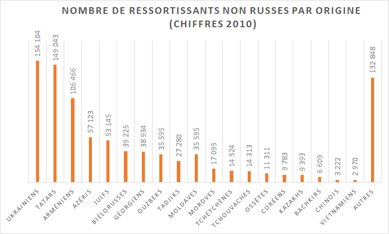 Ressortissants-non-russes-de-Moscou-par-origine en 2010